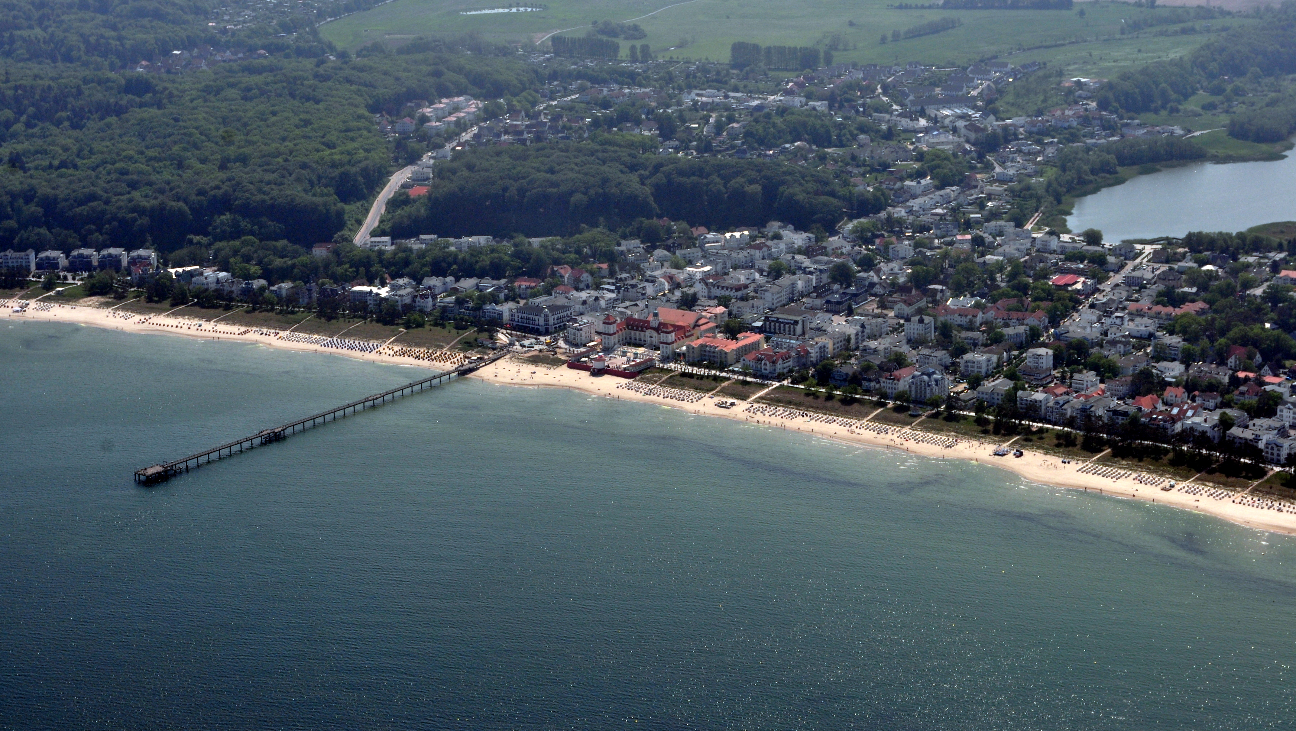 Die Bilder wurden von mir während eines einstündigen Rundflugs ab Flugplatz Güttin am 21. Mai 2011 aufgenommen. Die Bildbeschreibung steht im Dateinamen. Aufgenommen mit einer Nikon D5000 durch das Seitenfenster des Flugzeugs.